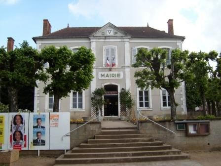 Mairie d'Ainay-le-Château